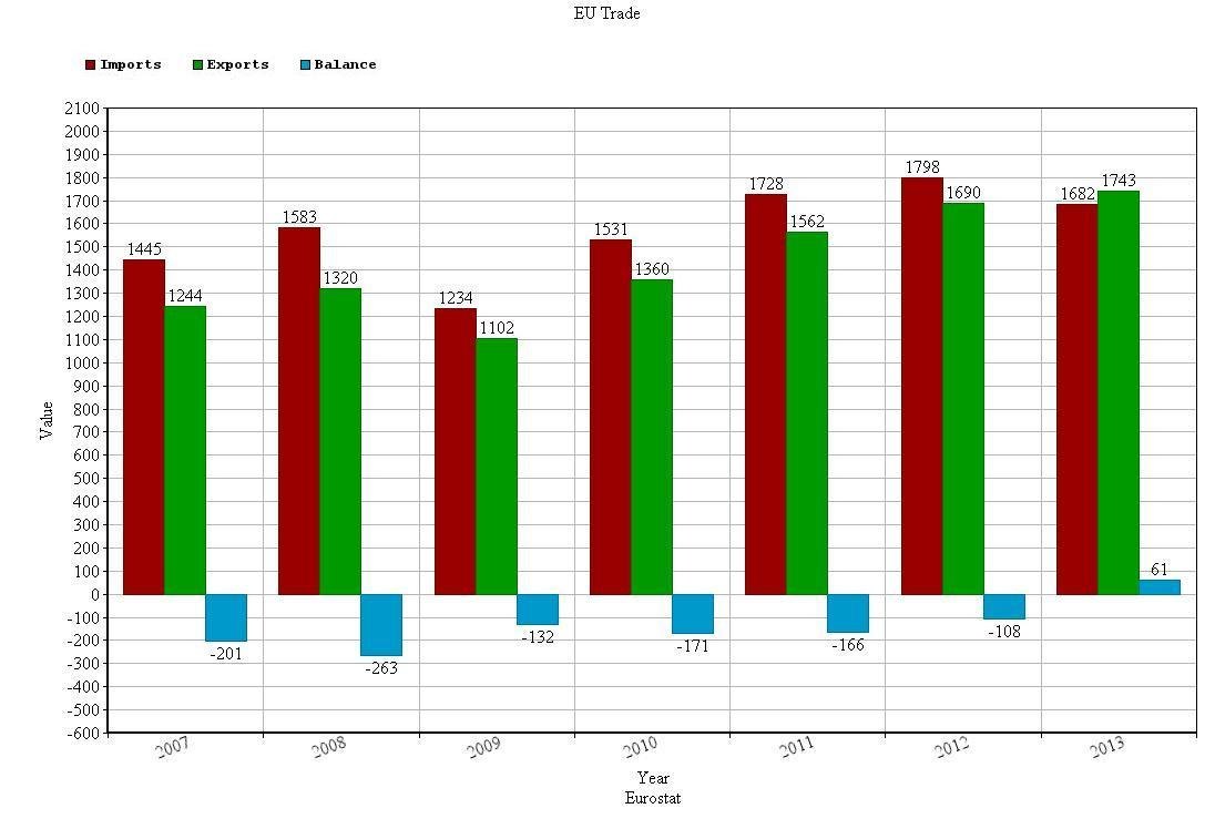 Внос, износ и баланс на търговията със стоки на ЕС.